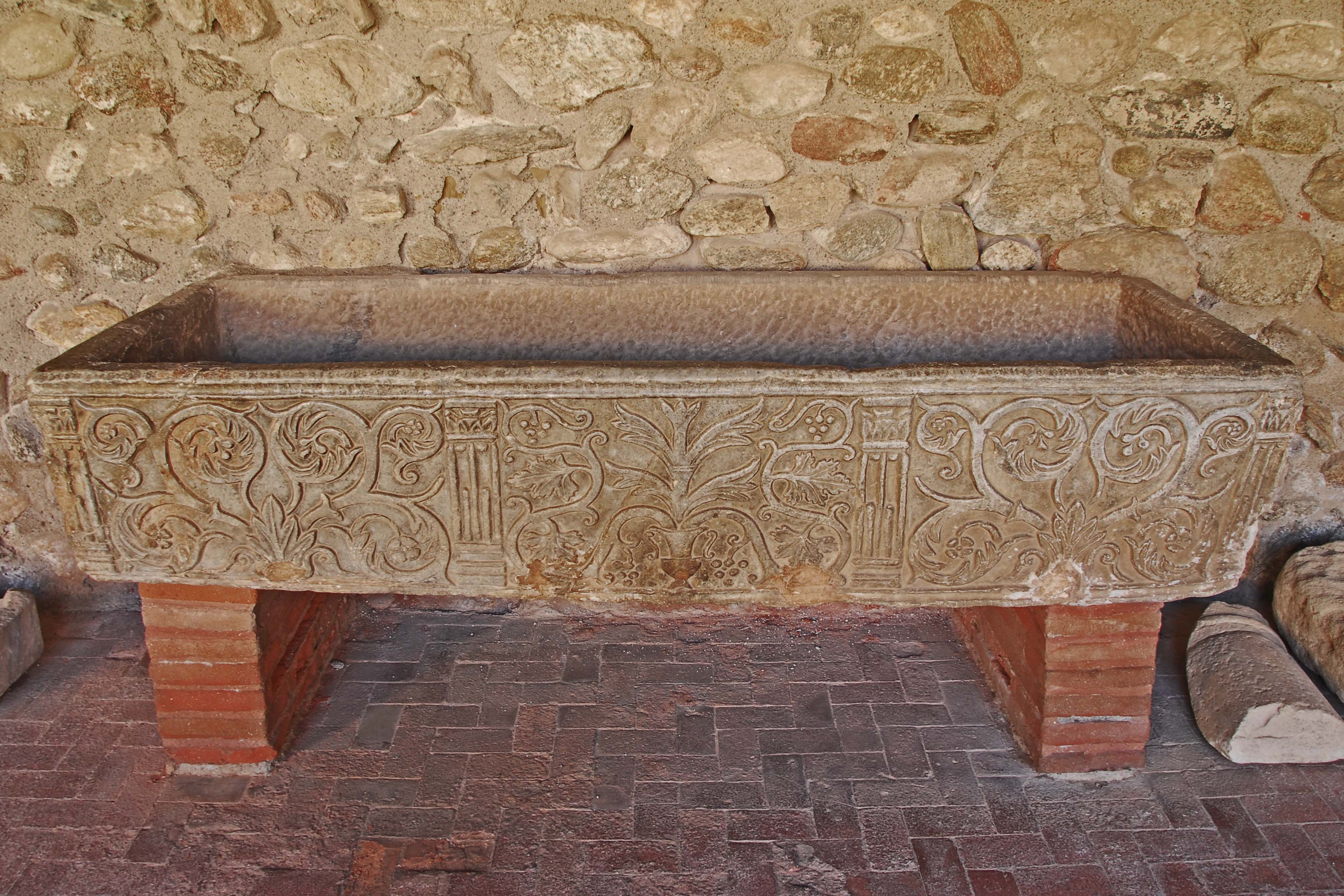 Ste-Eulalie-et-Ste-Julie_d’Elne, Sarkophag in Ostgalerie